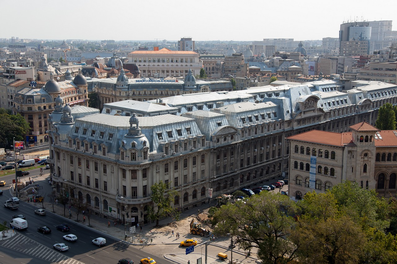 Bucharest